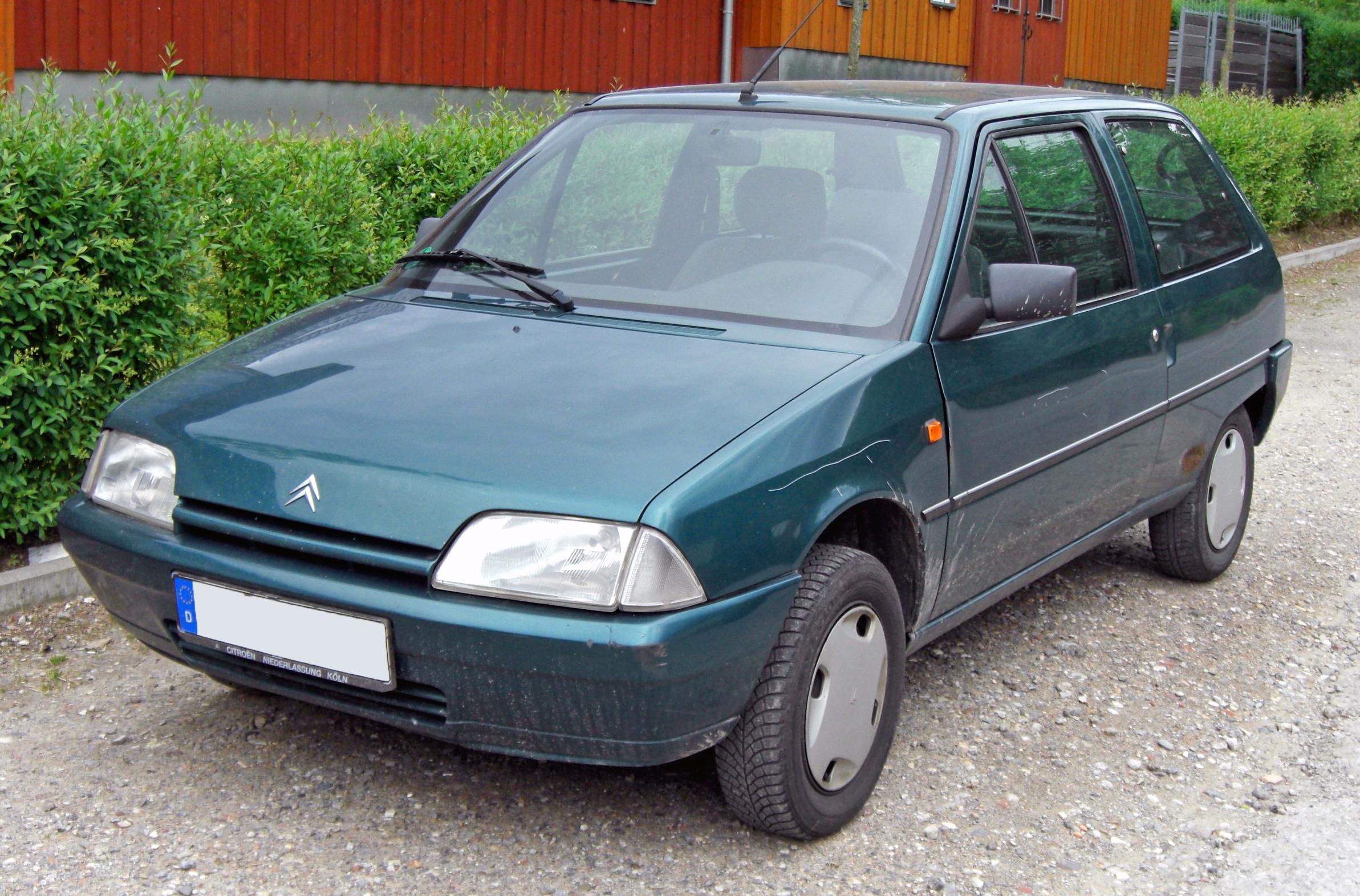 Citroën AX